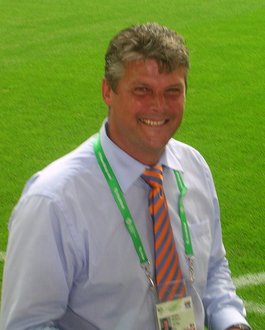 Norbert Dickel.